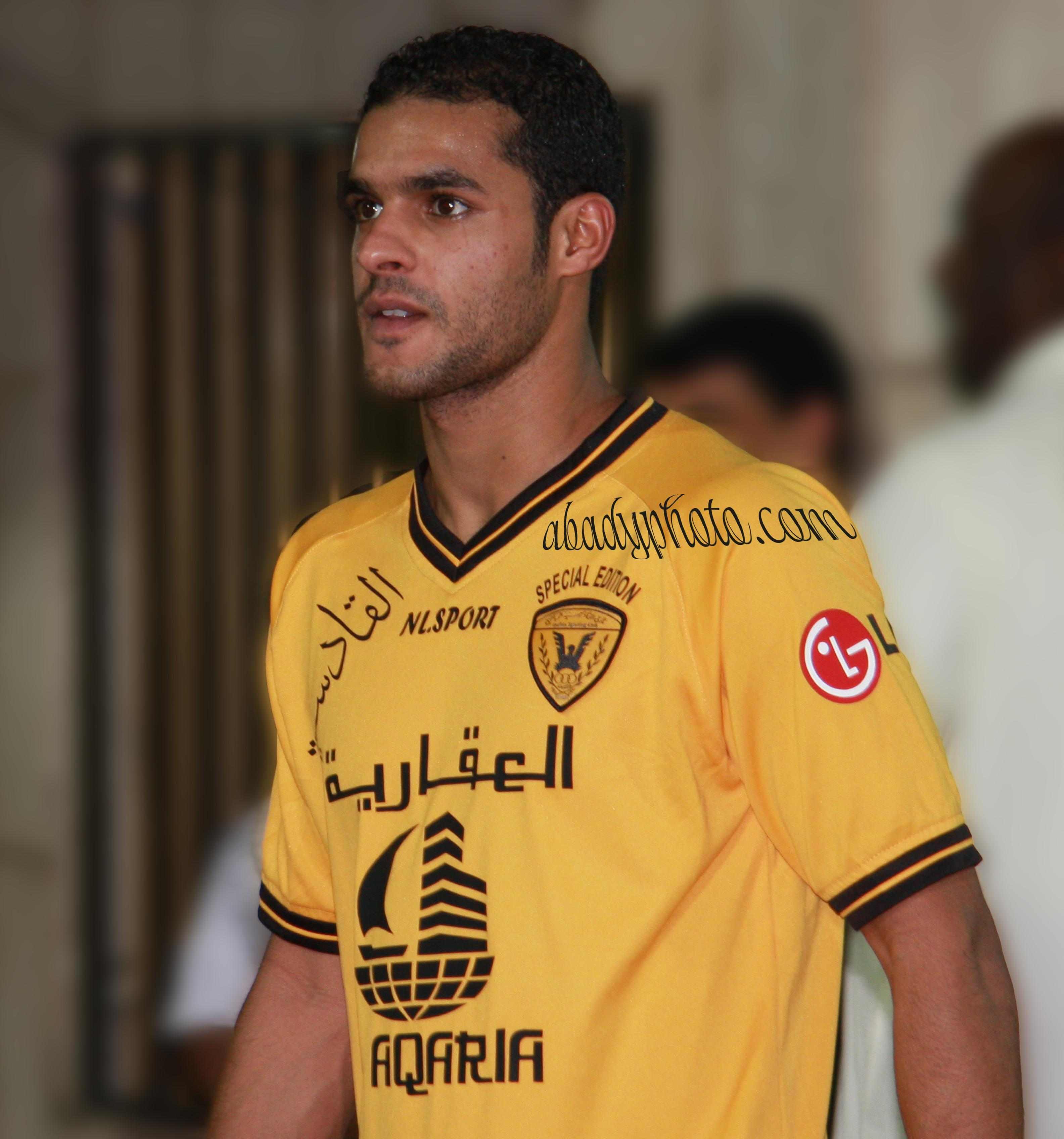 Bader Al-Mutwa